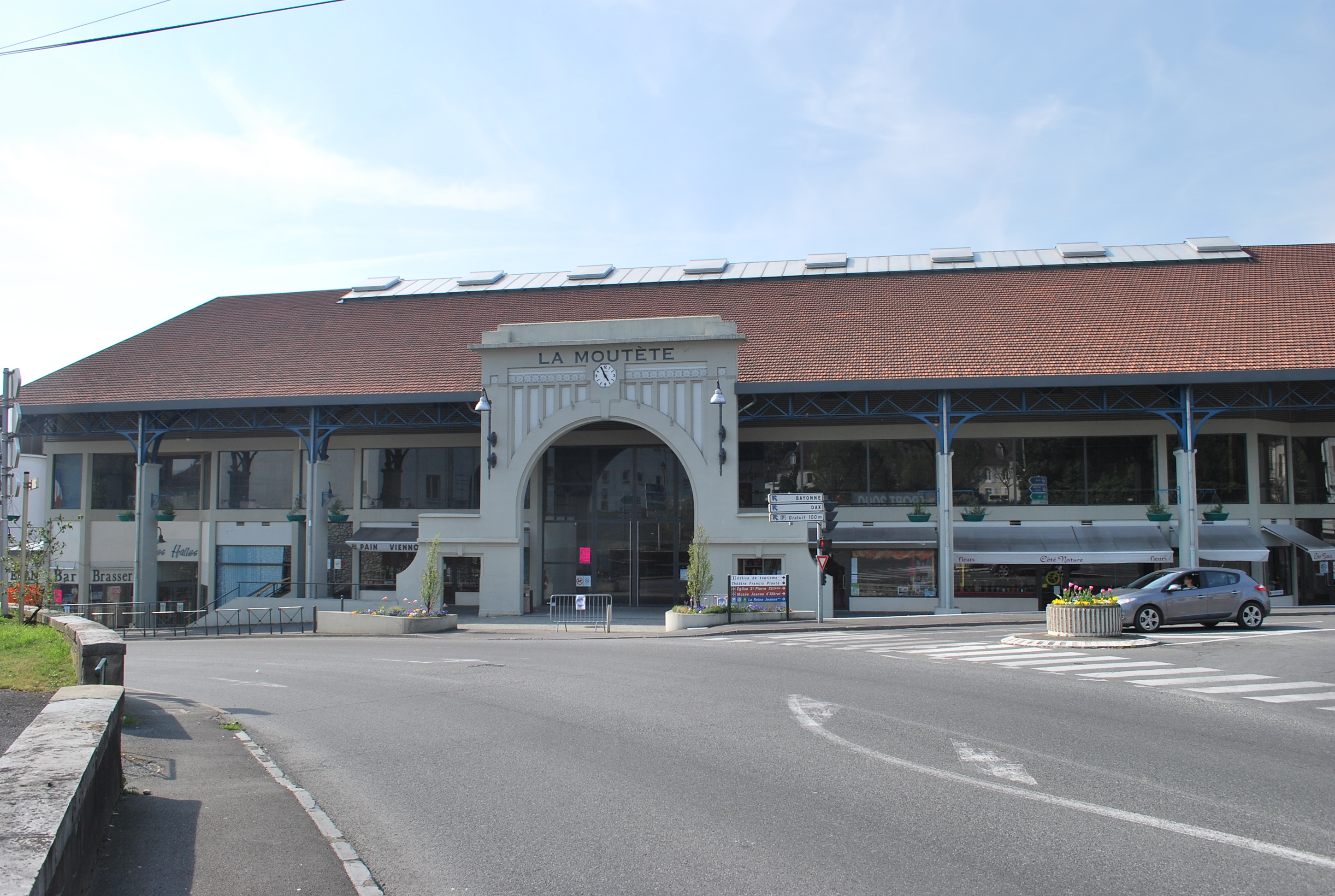 Marché couvert à Orthez ayant servi aux matchs de Basket de l'Elan Béarnais(Pyrénées-Atlantiques).